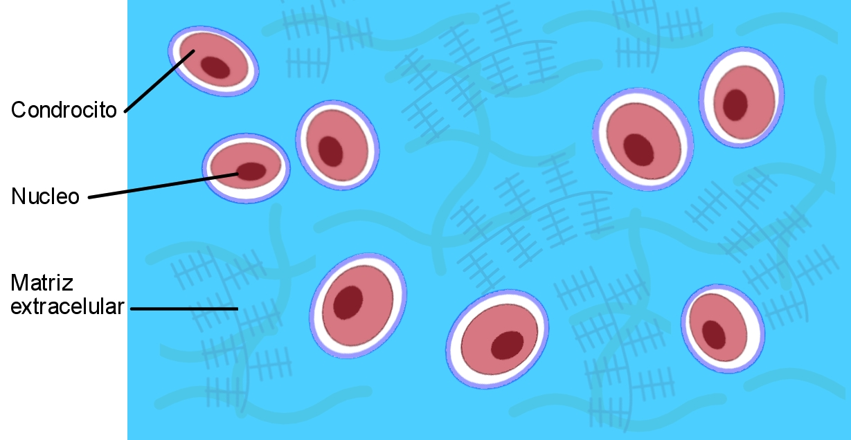 Representación de la estructura microscópica del cartílago hialino.